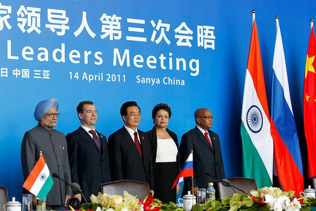 BRICS summit participants.